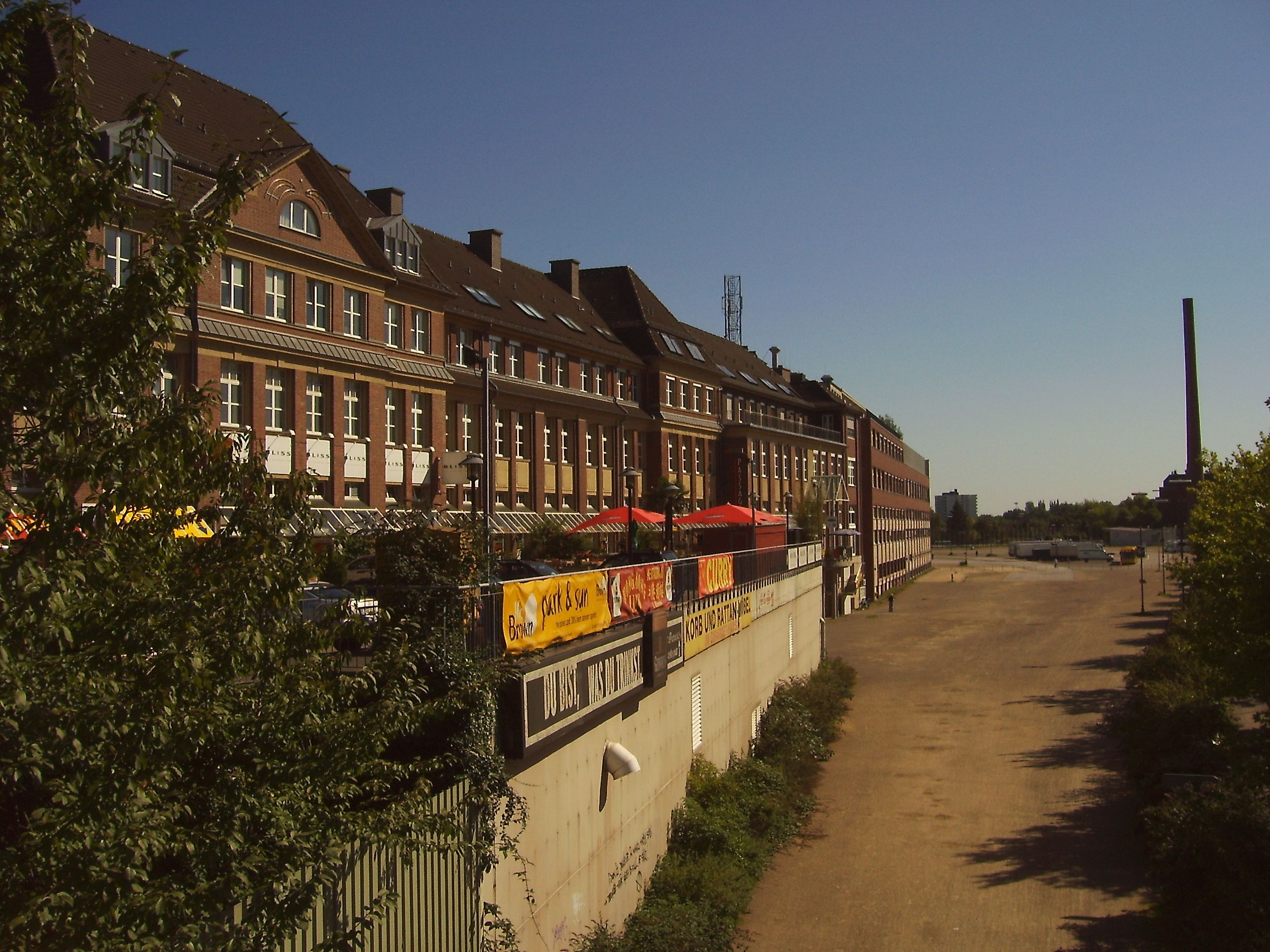 Essen-Rüttenscheid, Germany, Giradethaus